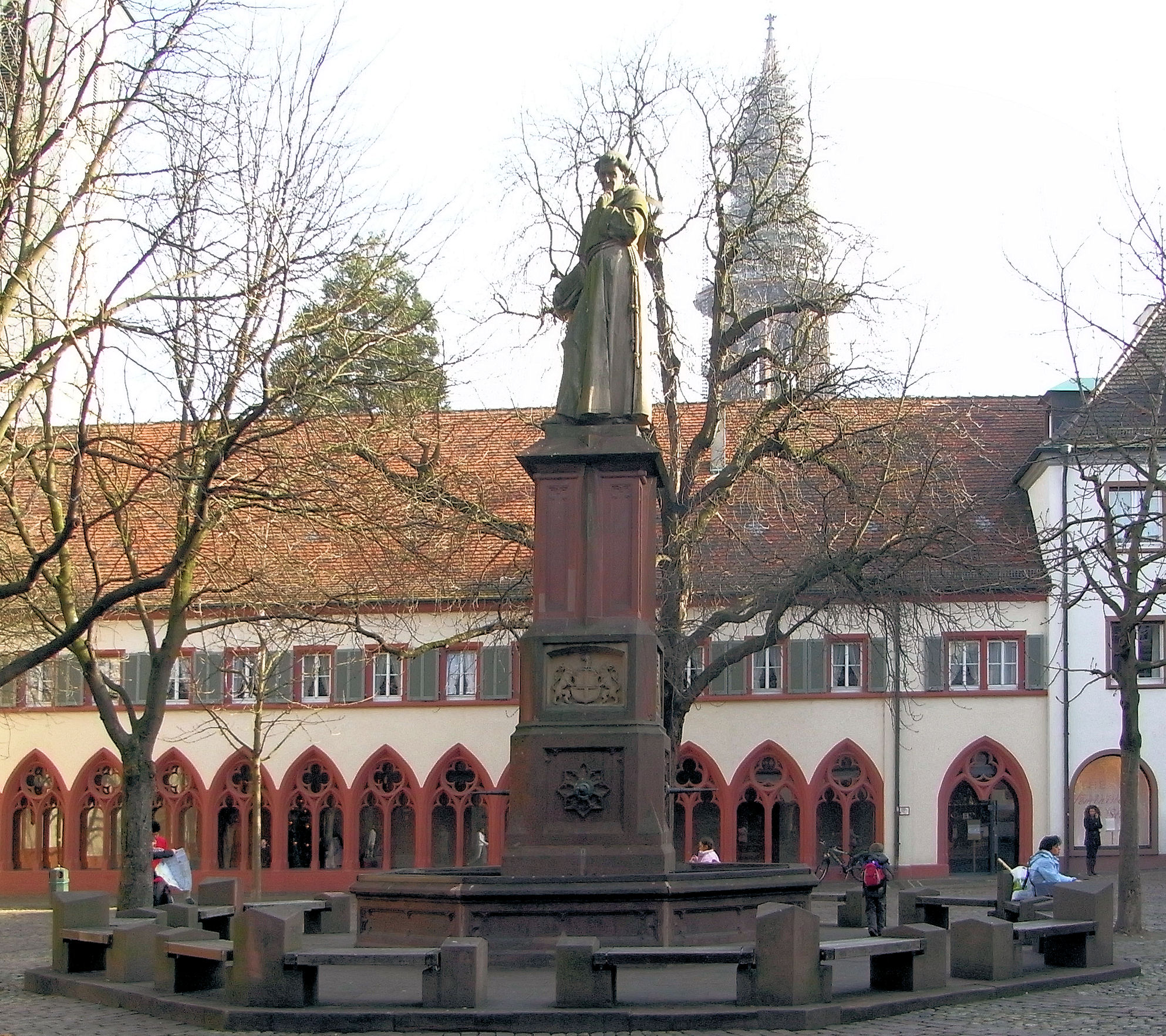 Brunnen für Berthold Schwarz am Rathaus Freiburg